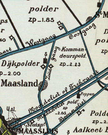 Kommandeurspolder